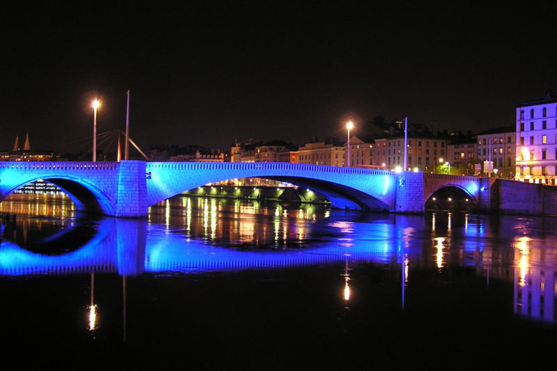 Lyon - France